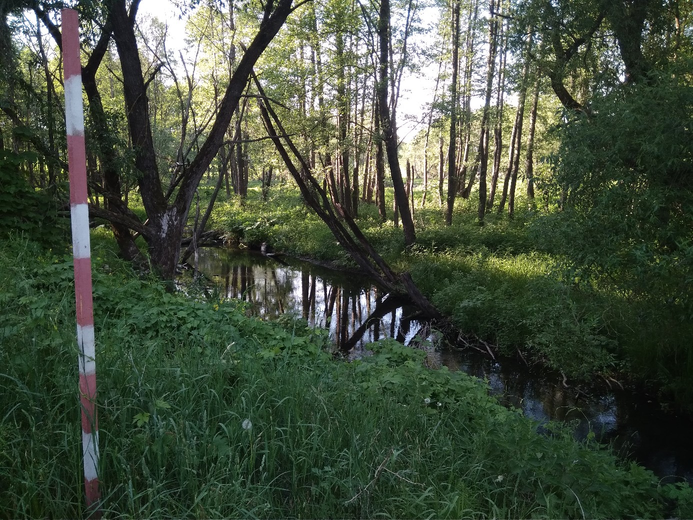 Река Жесть, протекающая возле аг. Даниловичи